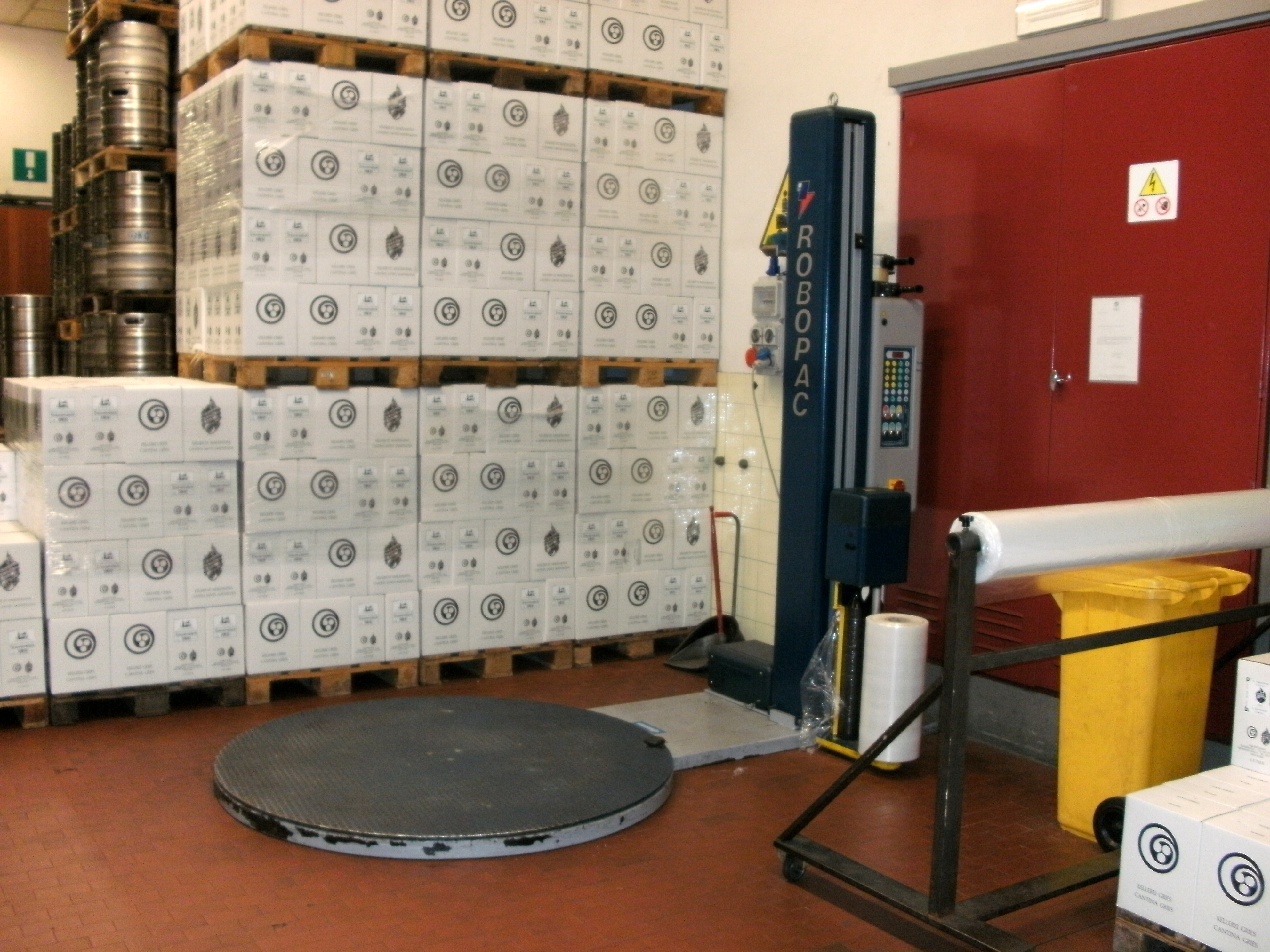 Kellerei Bozen in Gries - Palettenstretchwickler